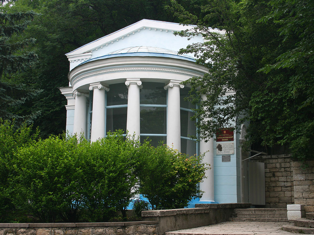 Бювет Лермонтовского источника